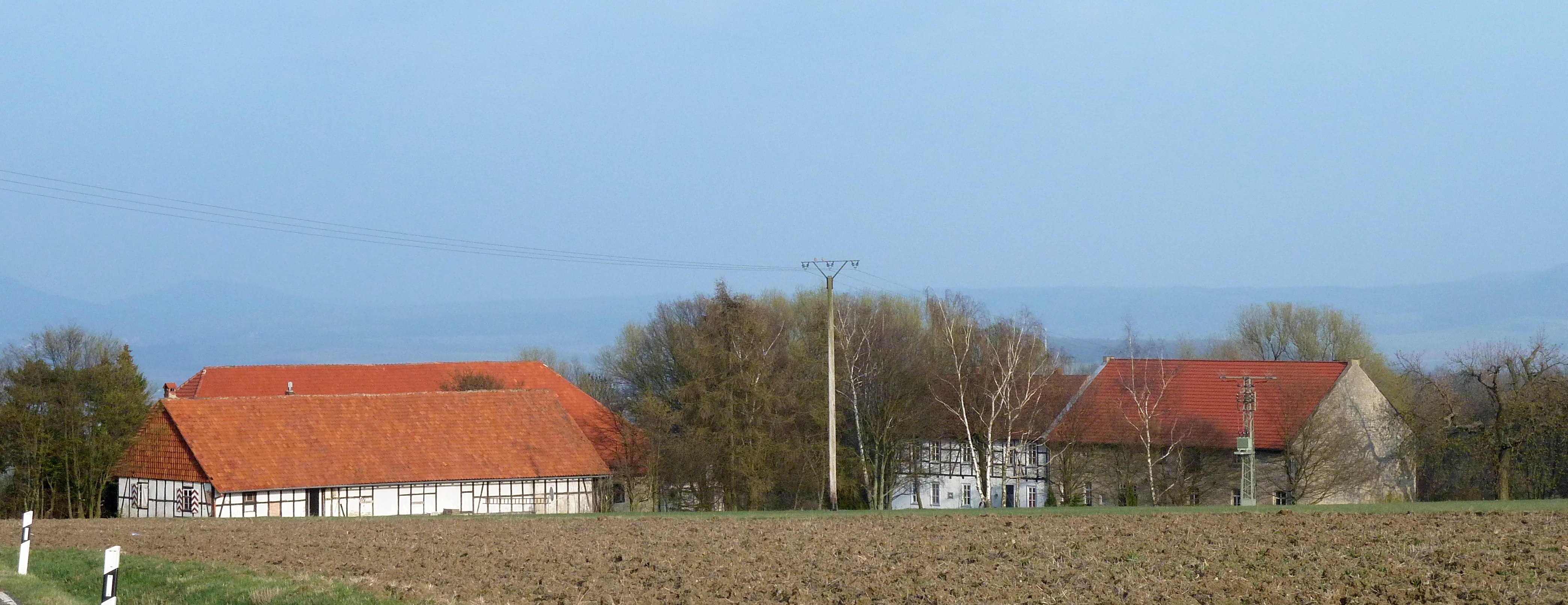 Vorwerk Örshausen bei Lemshausen, Gemeinde Rosdorf, Südniedersachsen.. Links in Fachwerk die Remise mit angebautem Wohnteil (2. Hälfte 19. Jh.), dahinter überwiegend verdeckt eine Sandsteinscheune, rechts Stall-/Speichergebäude in Natursteinmauerwerk, daran angebaut Fachwerkwohnhaus aus der 2. Hälfte des 19. Jahrhunderts mit in neuerer Zeit in Massivbauweise erneuertem Erdgeschoss.